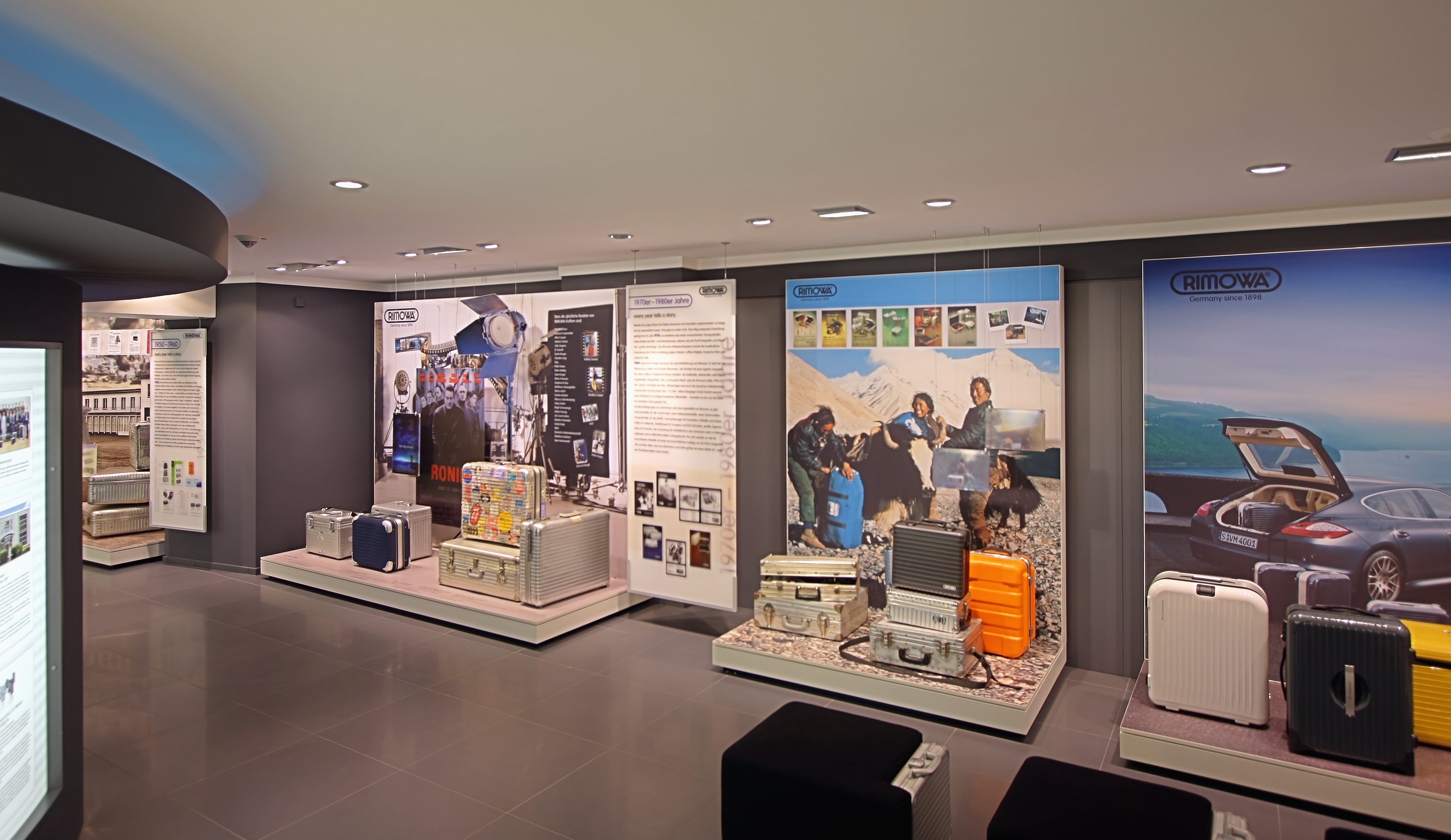 Flagshipstore des Kofferherstellers Rimowa in Köln, Am Hof. Auf der 1. Etage befindet sich ein Museum mit alten Rimowa-Koffern